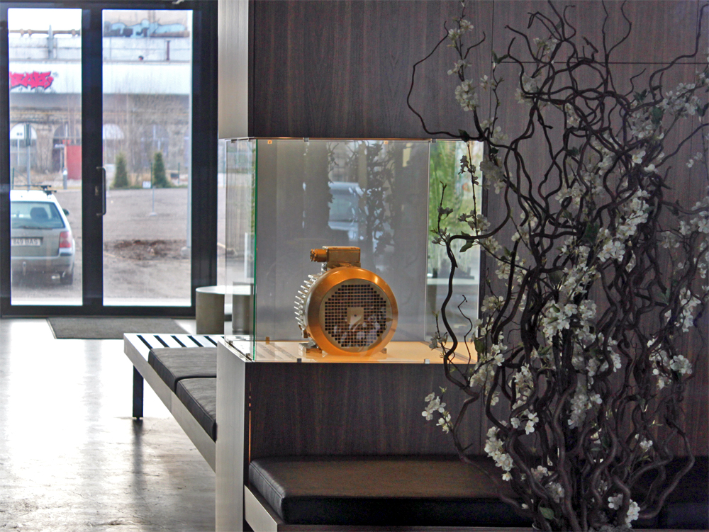 Позолоченный мотор советского завода «Вольта» под стеклом в холле жилого дома „Volta 47В Loftid”, 2017 год